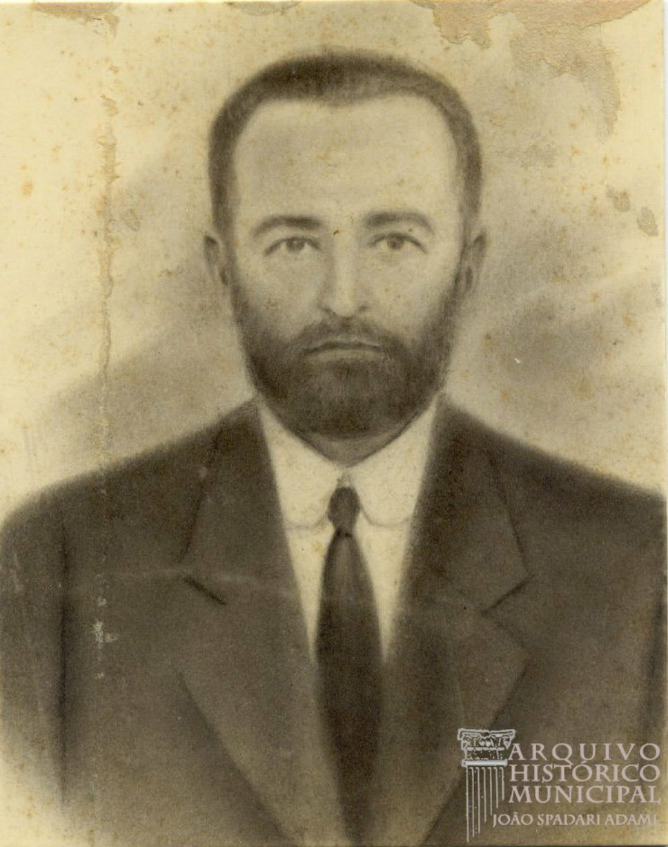 Domingos Maineri